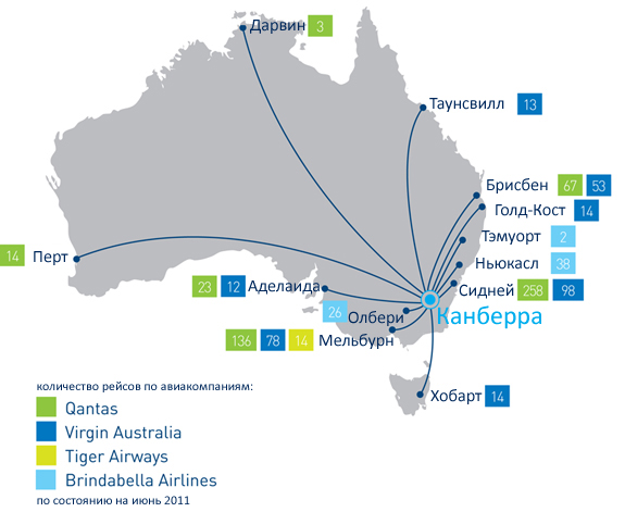 Карта внутренних авиалиний аэропорта Канберра